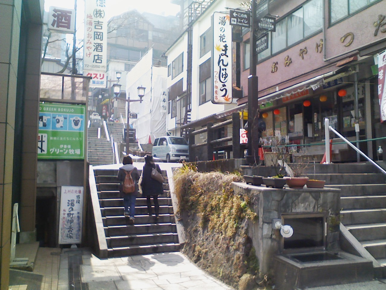 伊香保温泉 石段街